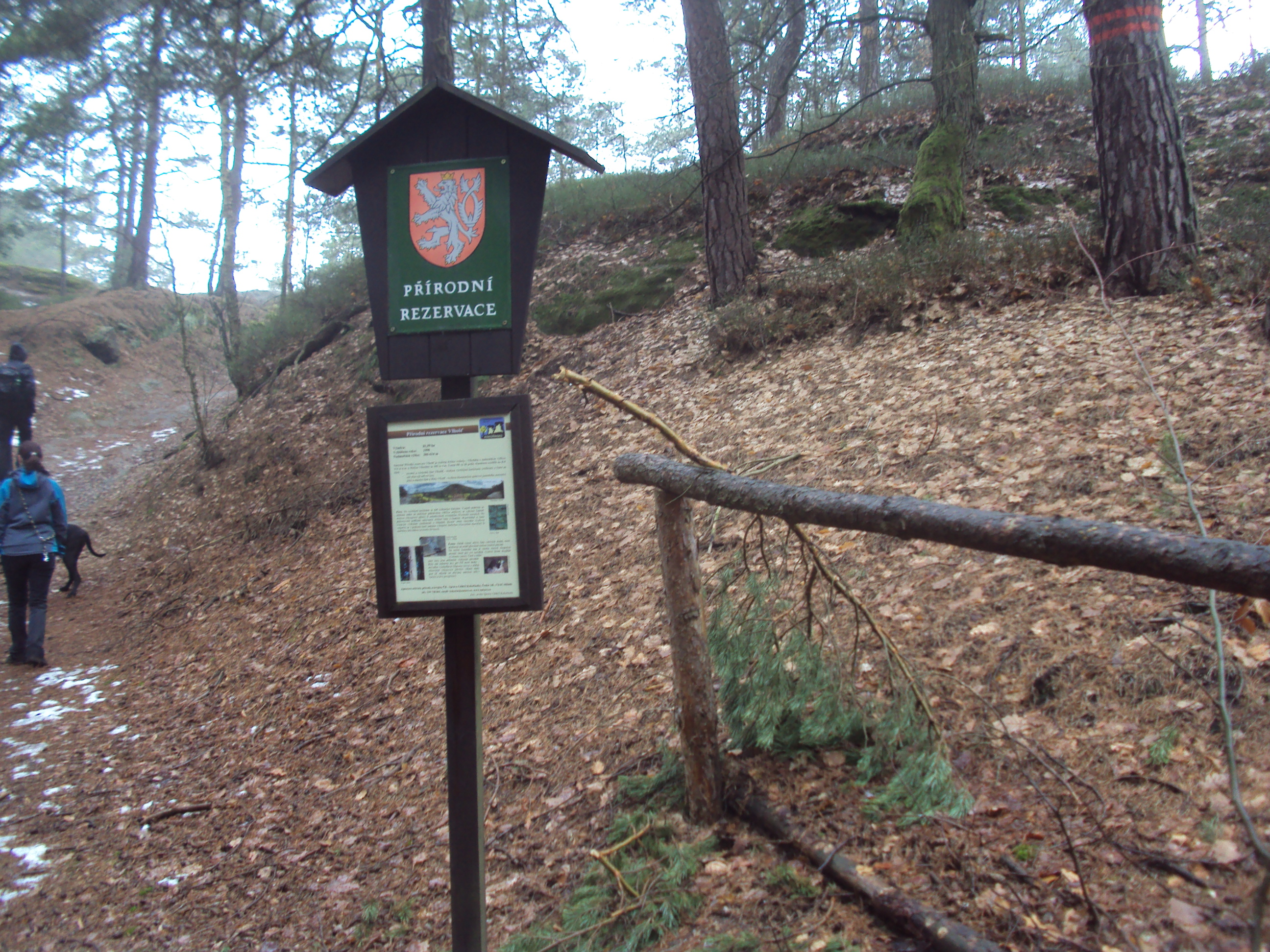 Česky: Začátek rezervace obou Vlhoští